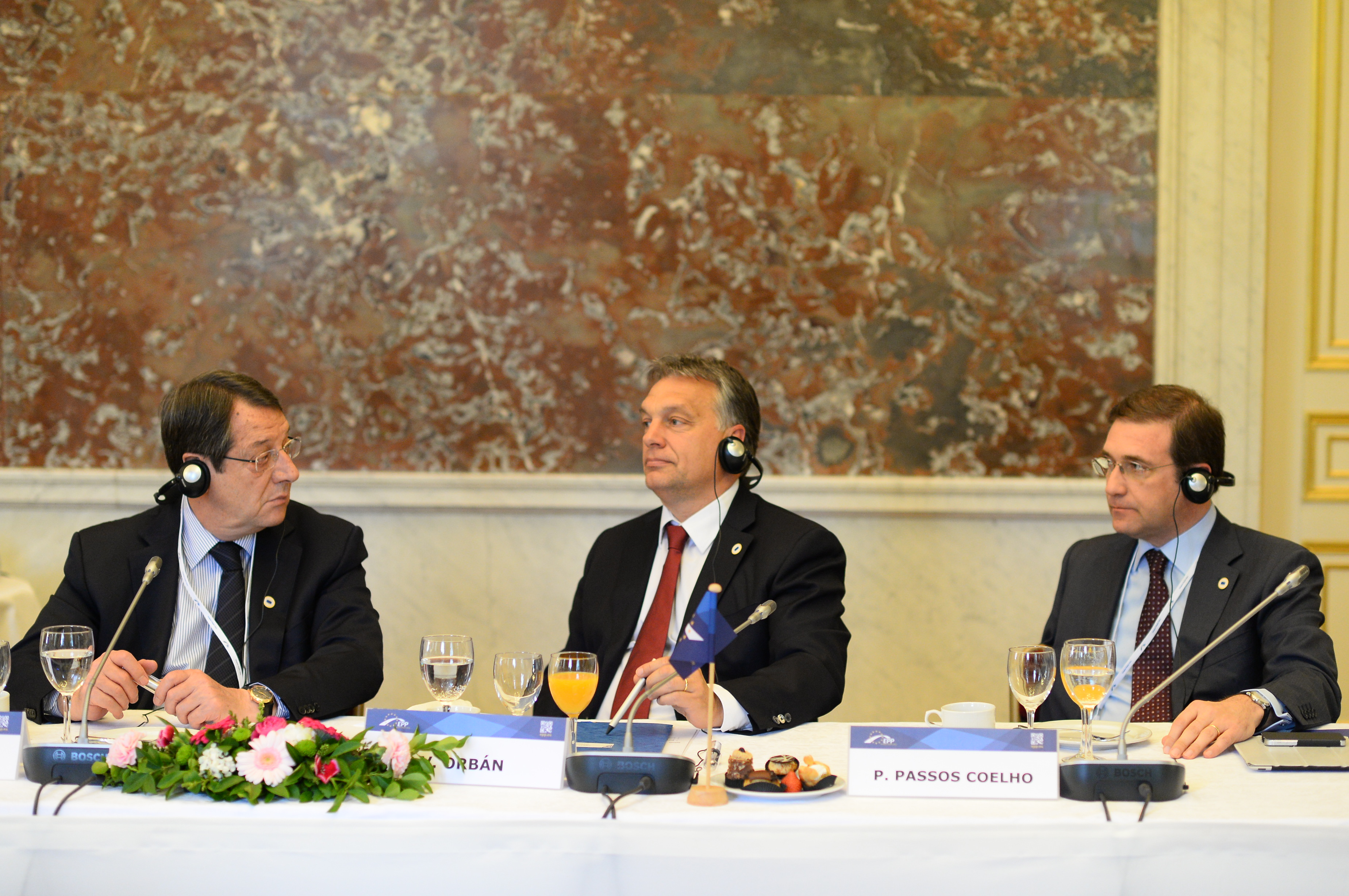 EPP Summit, Brussels, May 2014